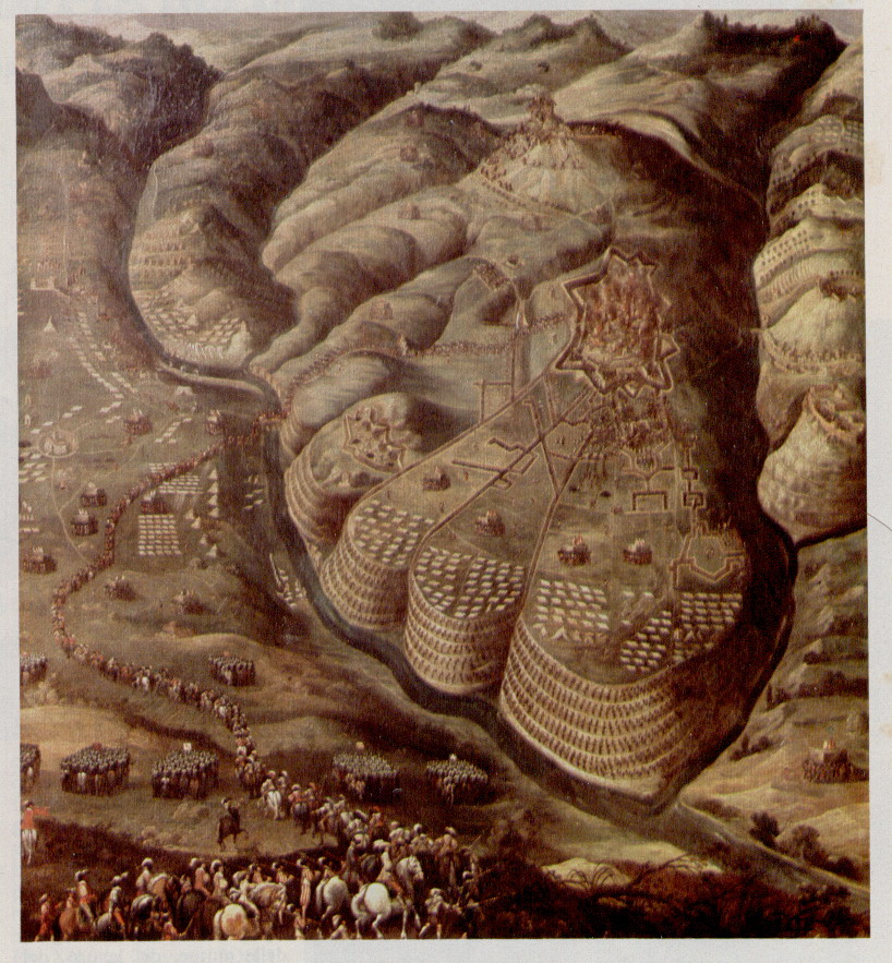 Prise de Privas. 28 mai 1629